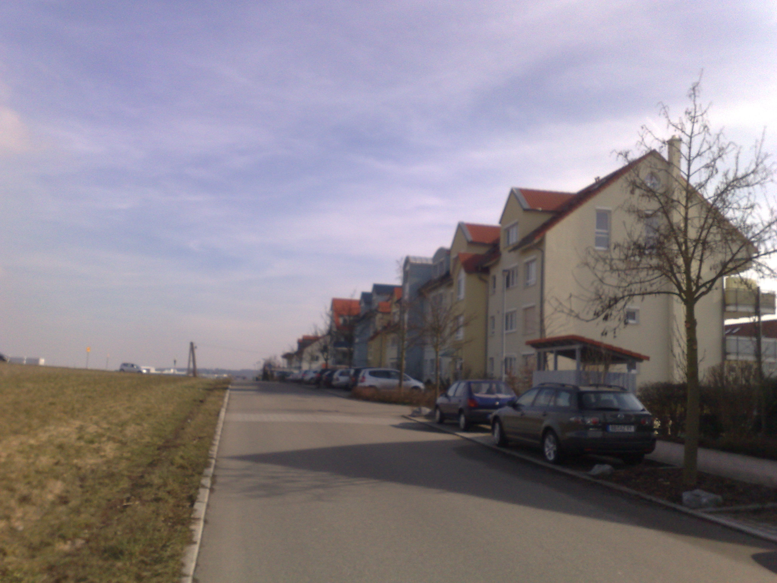 Renningen, Neubaugebiet Schnallenäcker